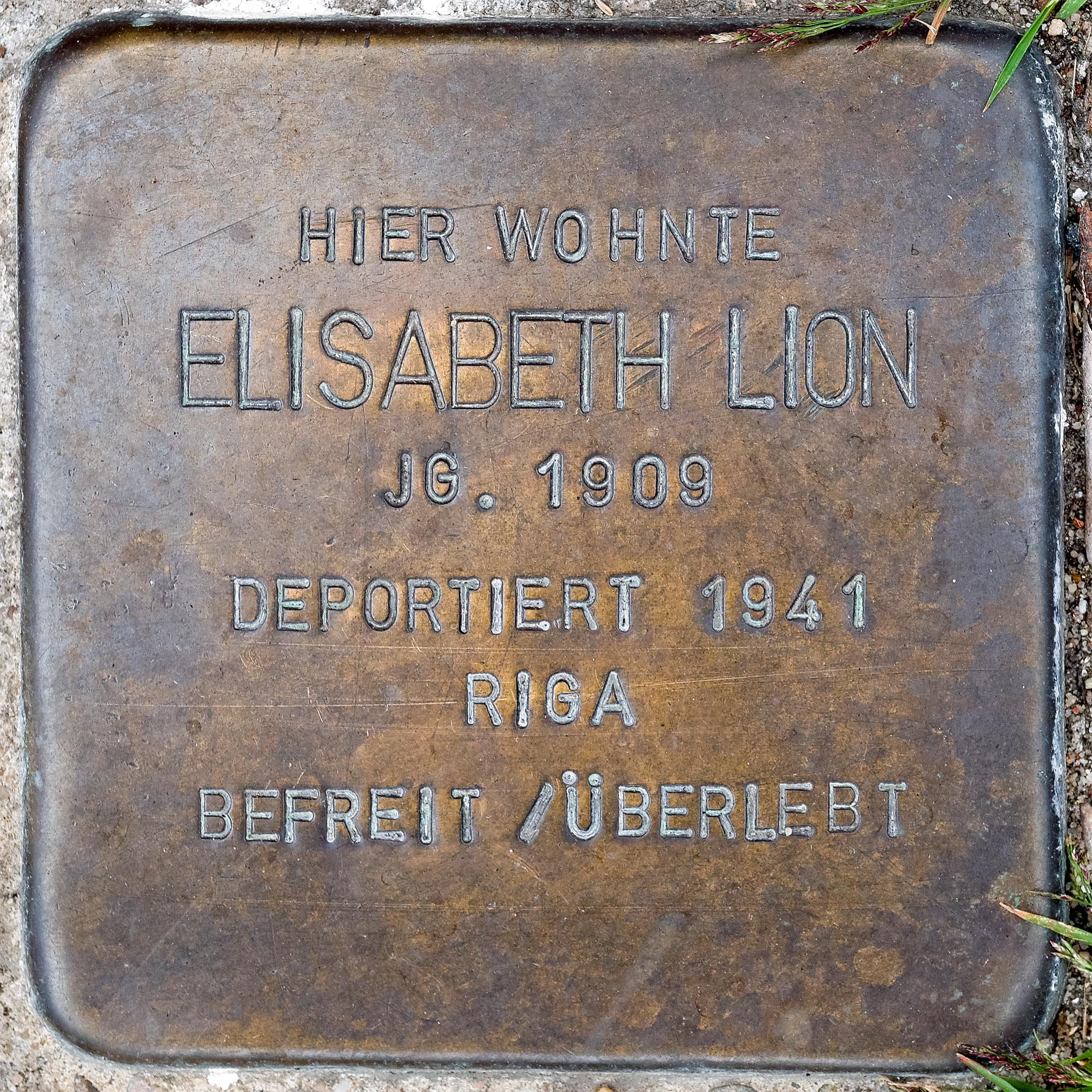 Stolperstein Lion, Elisabeth